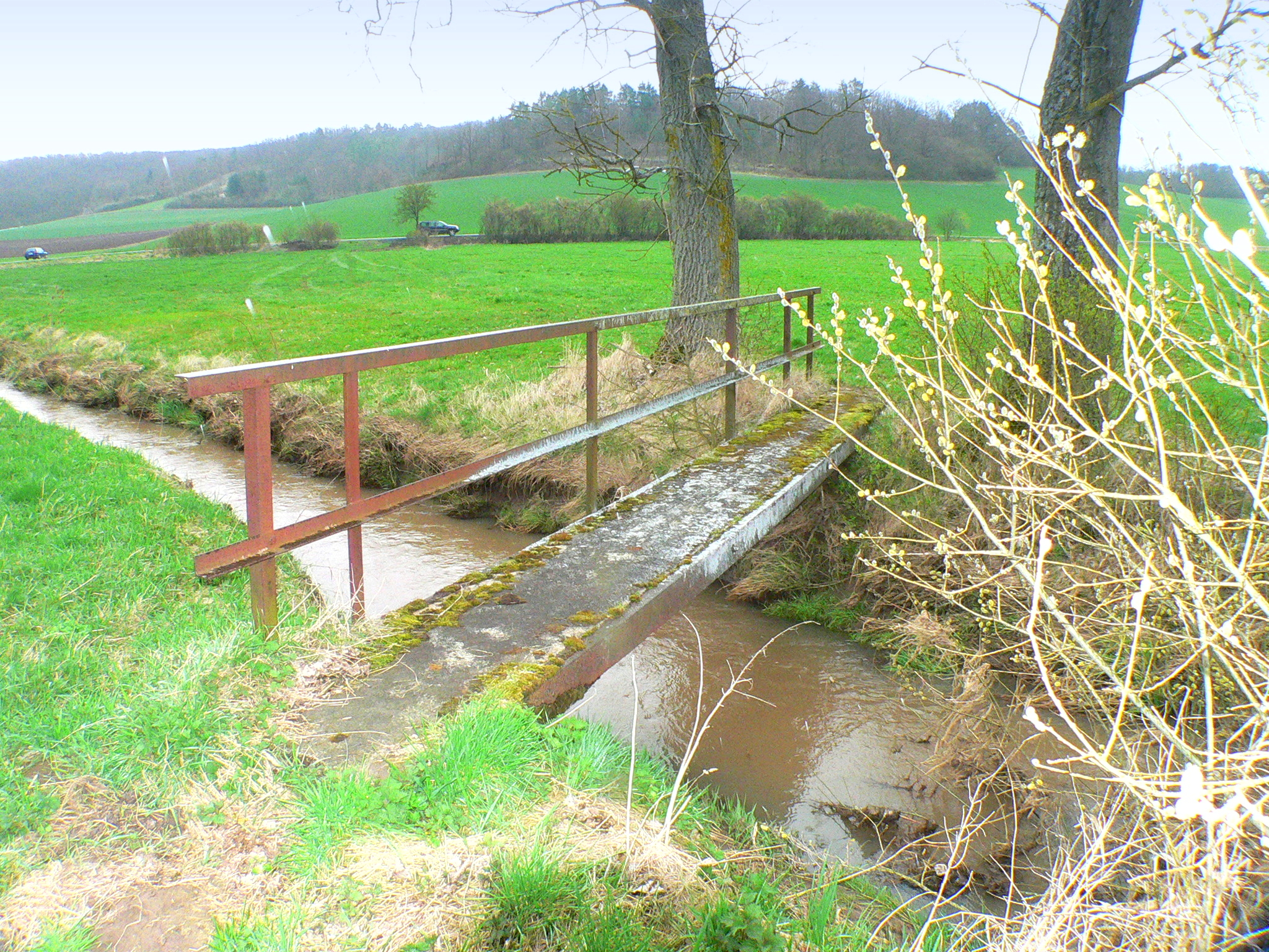 Brücke über die junge Fränkische Saale bei Untereßfeld